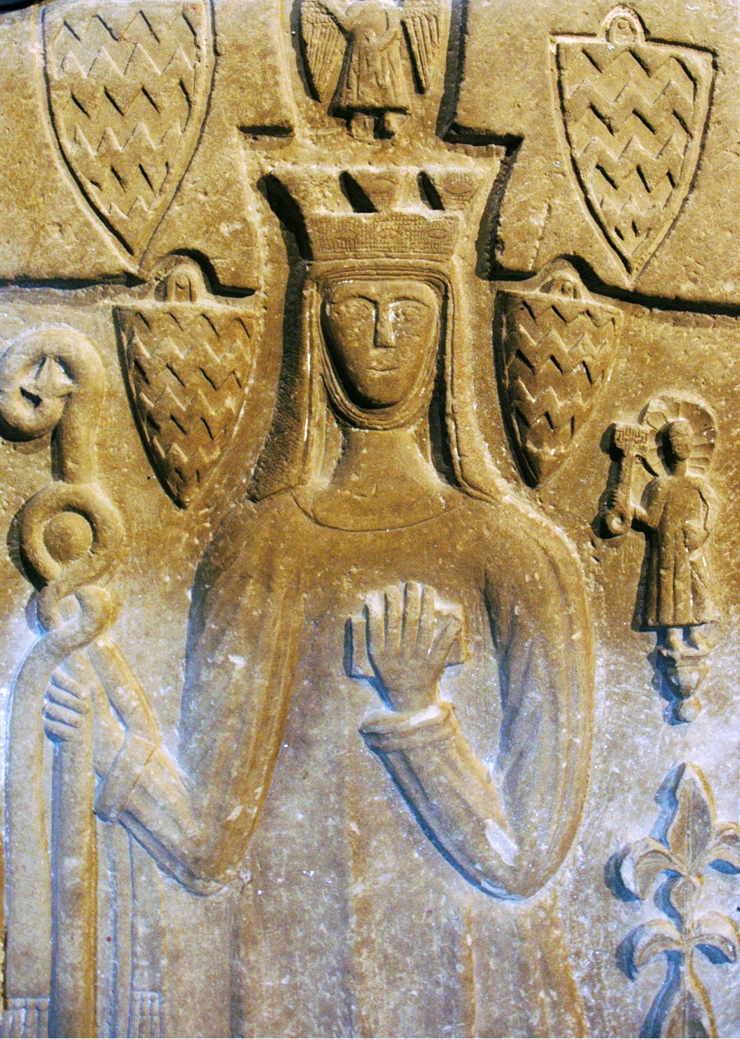 Vallbona de les Monges - Tomba Eldiarda, abadessa de la família Anglesola